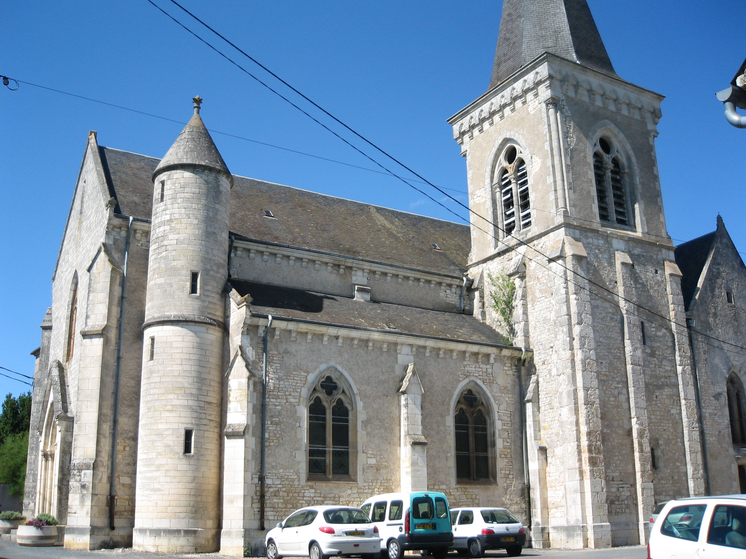 Eglise Notre Dame, XII°, XIV° ou XV° et XIX°, Mareuil.